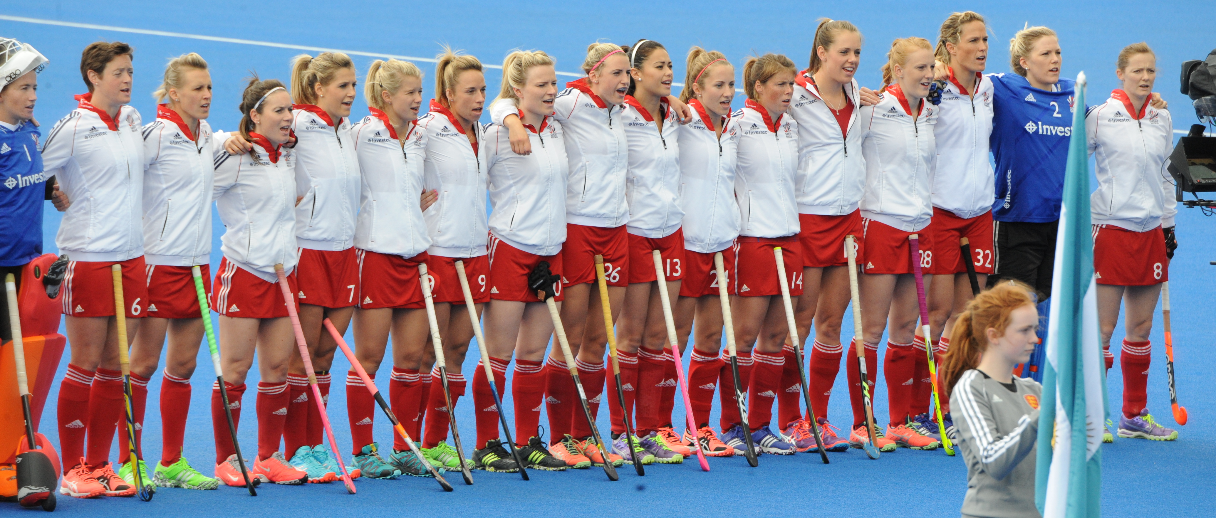 GB v Argentina 2016 CT